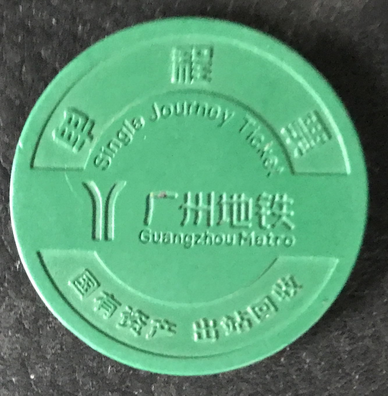 広州地下鉄の片道切符